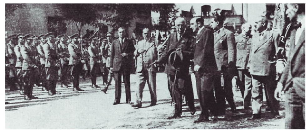 Niceto Alcalá Zamora 1932ko irailaren 14an Iruna (Gipuzkoa) egindako bisitan.